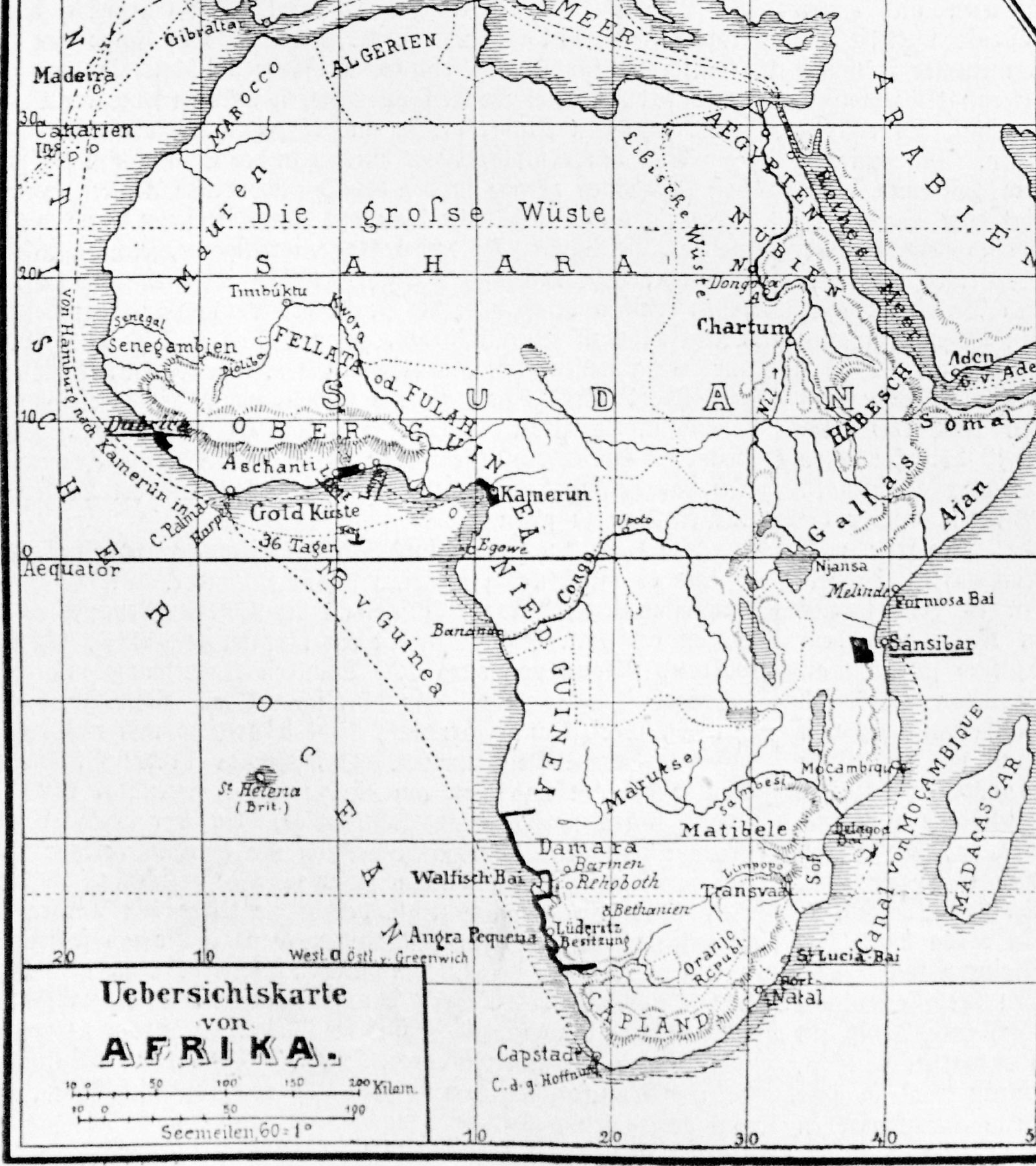 Karte der Deutschen Kolonien in Afrika um 1885.